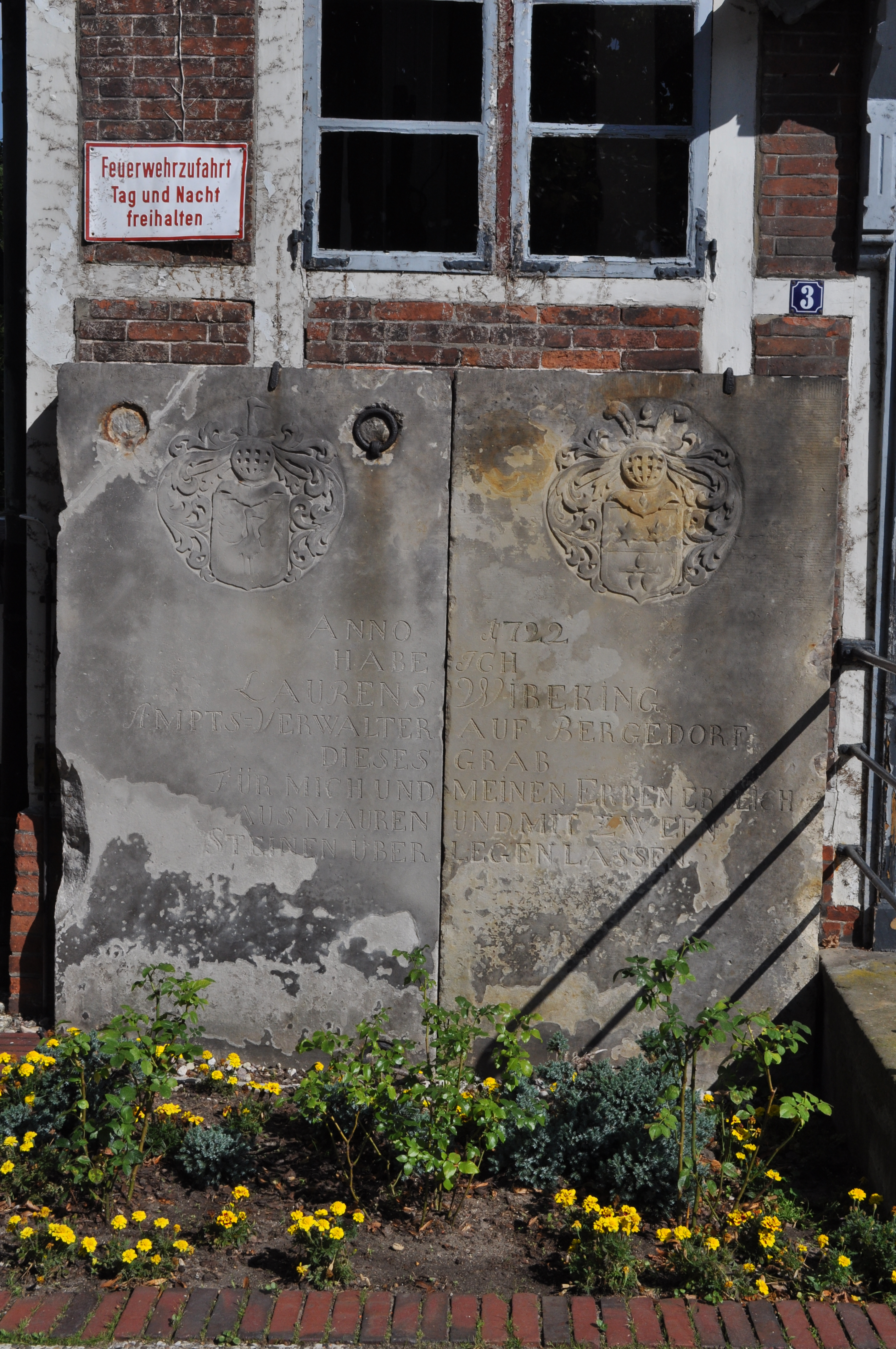 Grabplatten an der St.-Petri-und-Pauli-Kirche in Hamburg-Bergedorf. This is a photograph of an architectural monument.